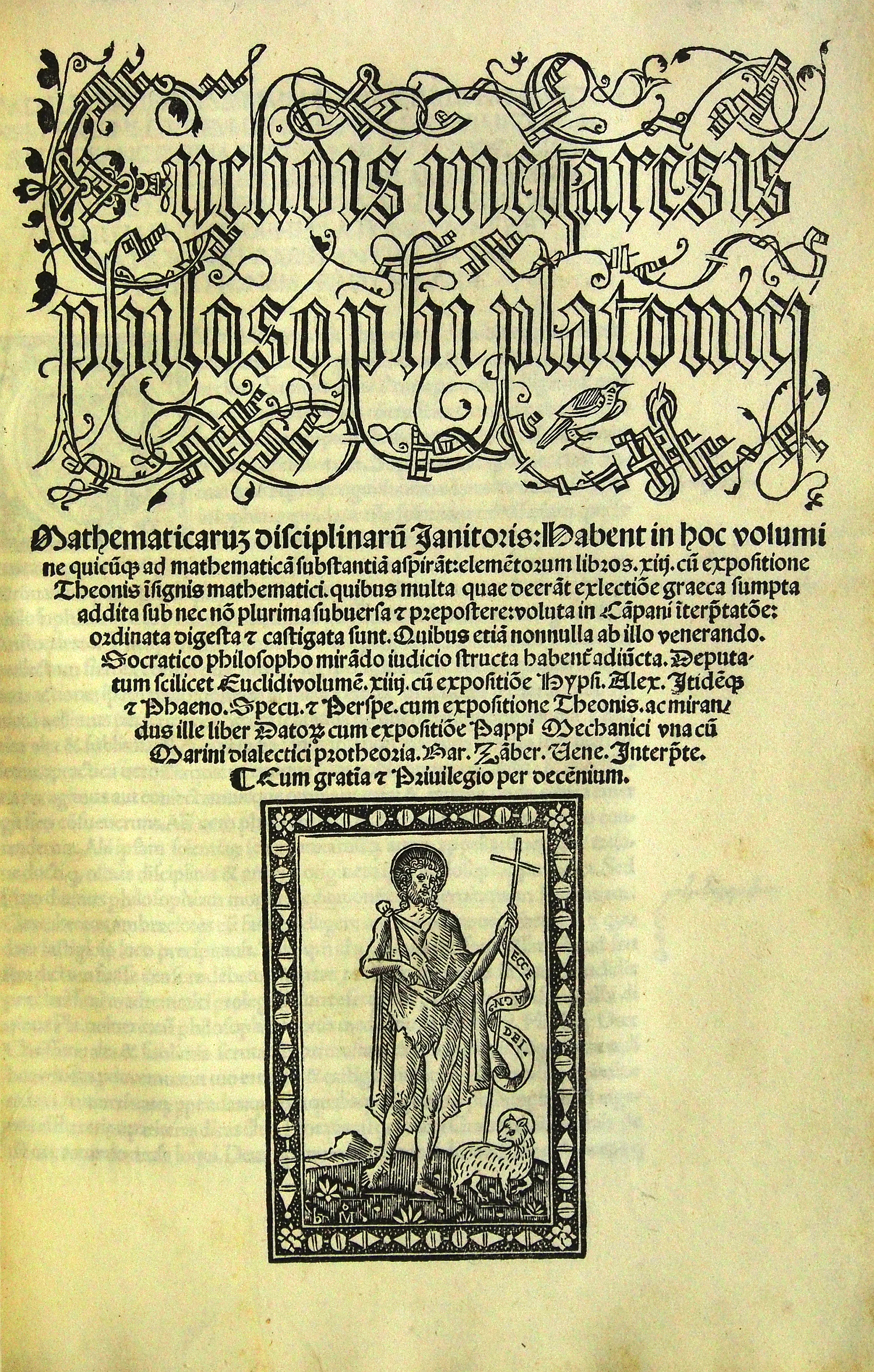 Titelblatt des Buches "Die Elemente" des griechischen Mathematikers Euklid aus dem Jahre 1505.